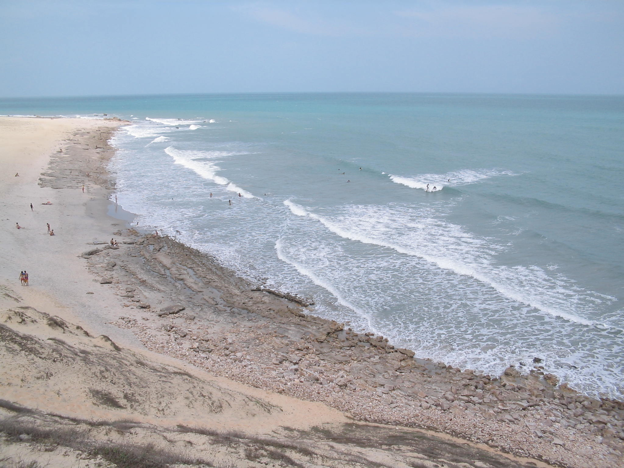 Jericoacoara